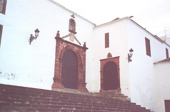 Church of Santo Domingo, Santa Cruz de La Palma